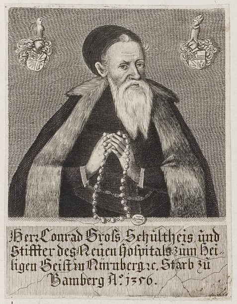 Grafik aus dem Klebeband Nr. 3 der Fürstlich Waldeckschen Hofbibliothek Arolsen Motiv: Konrad Groß († 1356), Ratskonsulent und Reichsschultheiß in Nürnberg; 1332/39 Gründung des Heilig-Geist-Spitals in Nürnberg; Stiftung der Klöster Himmelthron (1343/48 nach Gründlach verlegt), Pillenreuth (1345) und des Spitals zu Kitzingen (1340)